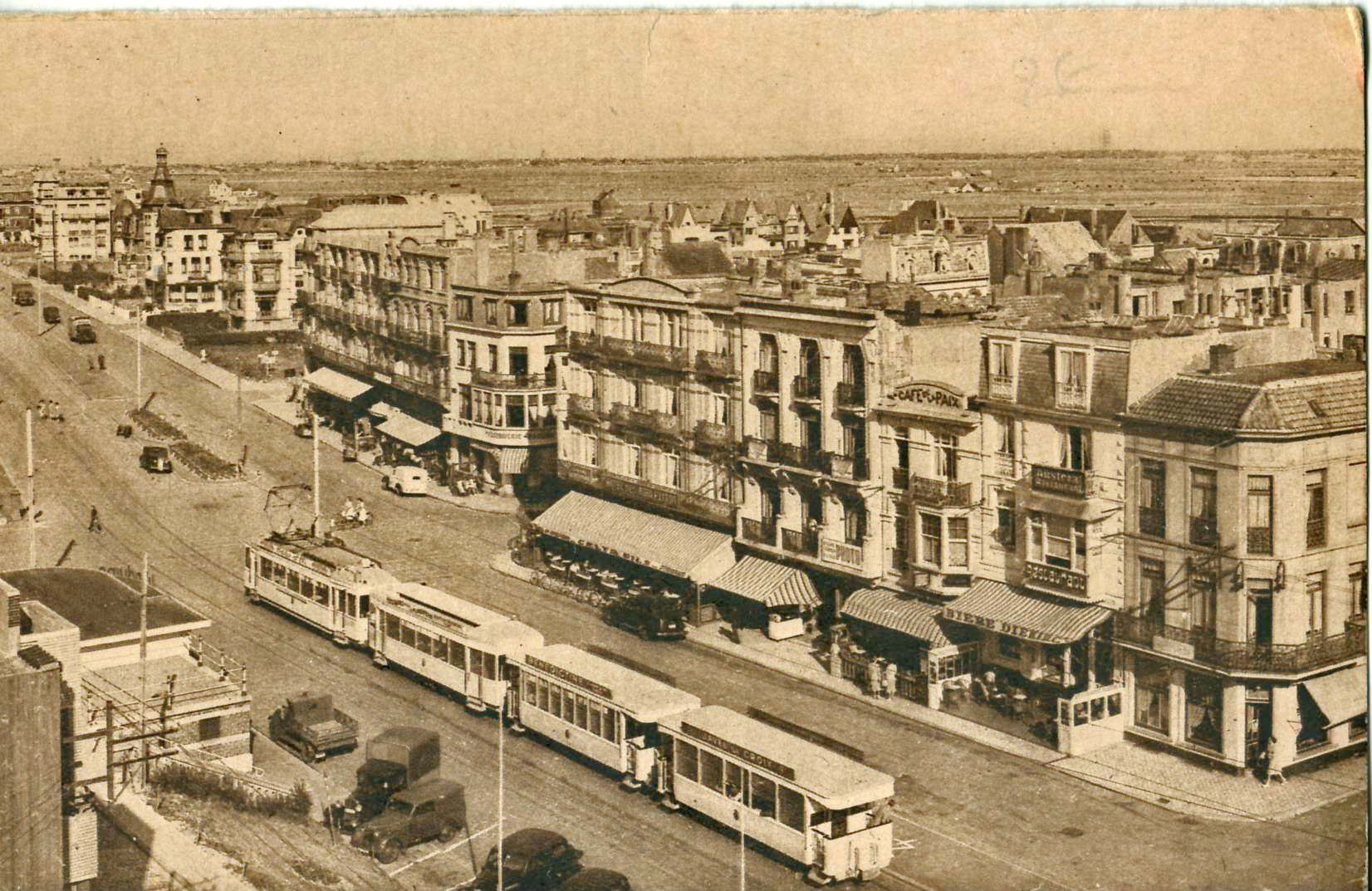 Carte postale ancienne éditée par ARFO n°605 :WENDUYNE - Avenue De Smet-de-Nayer.Vue en gros plan d'une rame du Tramway de la côte belge